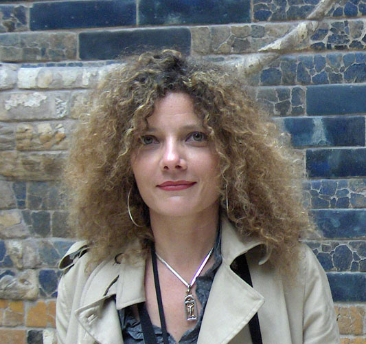 Karla Suárez